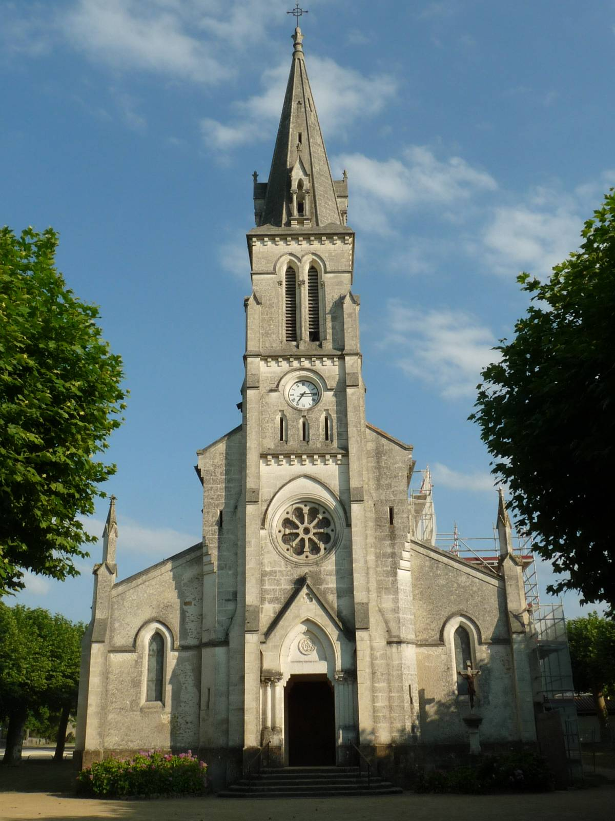 église de Labrit, Landes, France